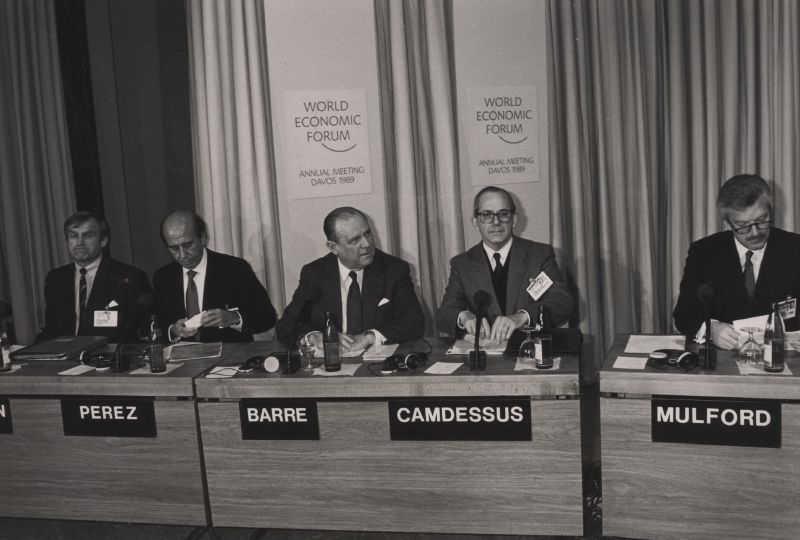 Helmut Haussmann, Carlos Andrés Pérez, Raymond Barre, Michel Camdessus et David Campbell Mulford